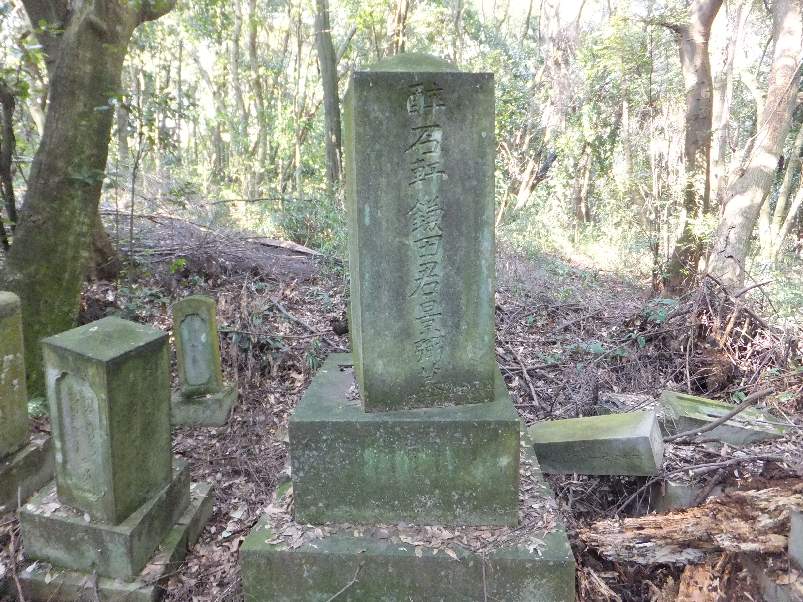 鎌田景弼の墓